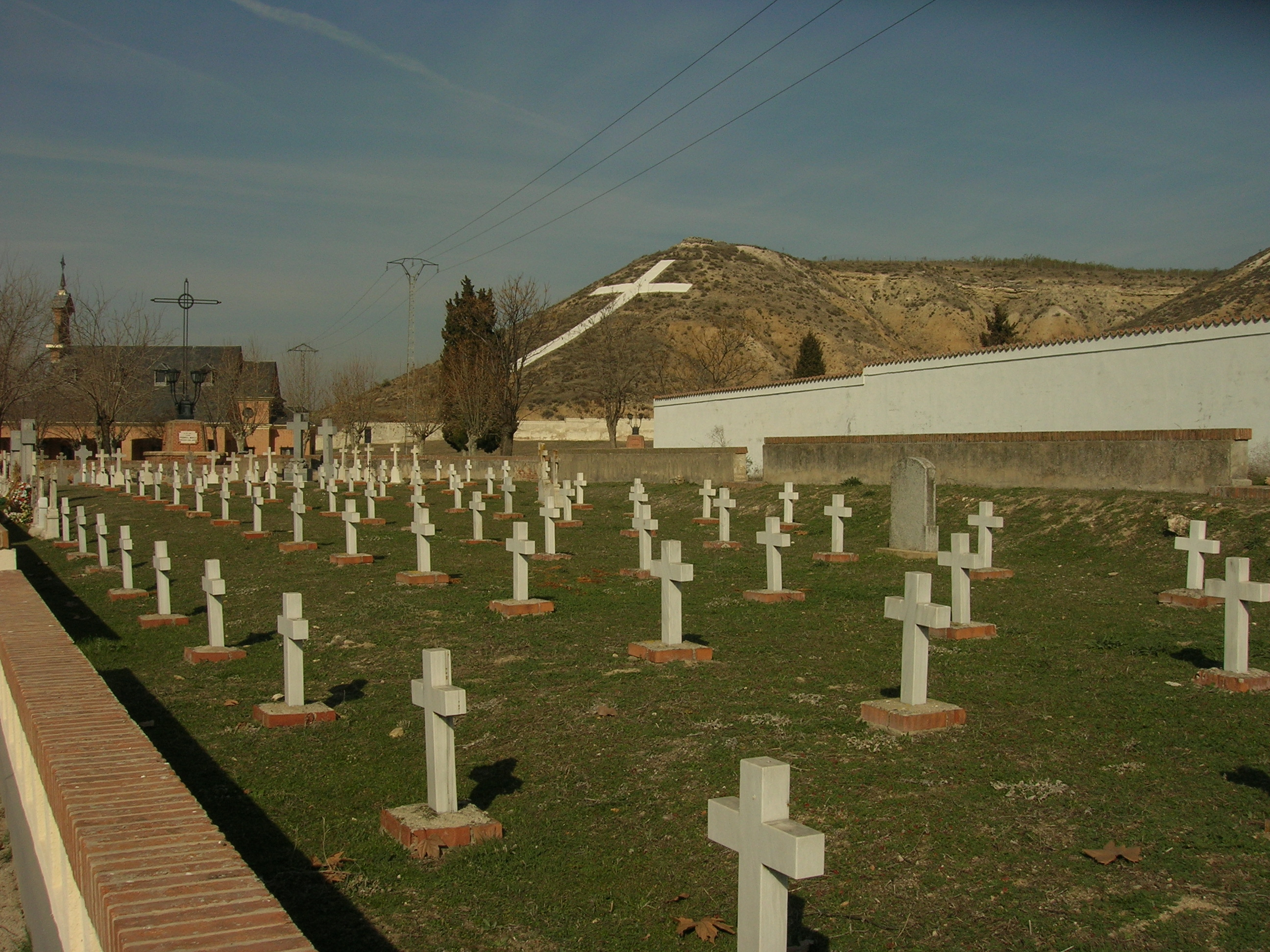 Vista general de la Fosa II en el cementerio de las Matanzas de Paracuellos. En segundo plano, a la izquierda, la ermita y al fondo, la gran cruz visible desde el aeropuerto de Barajas .